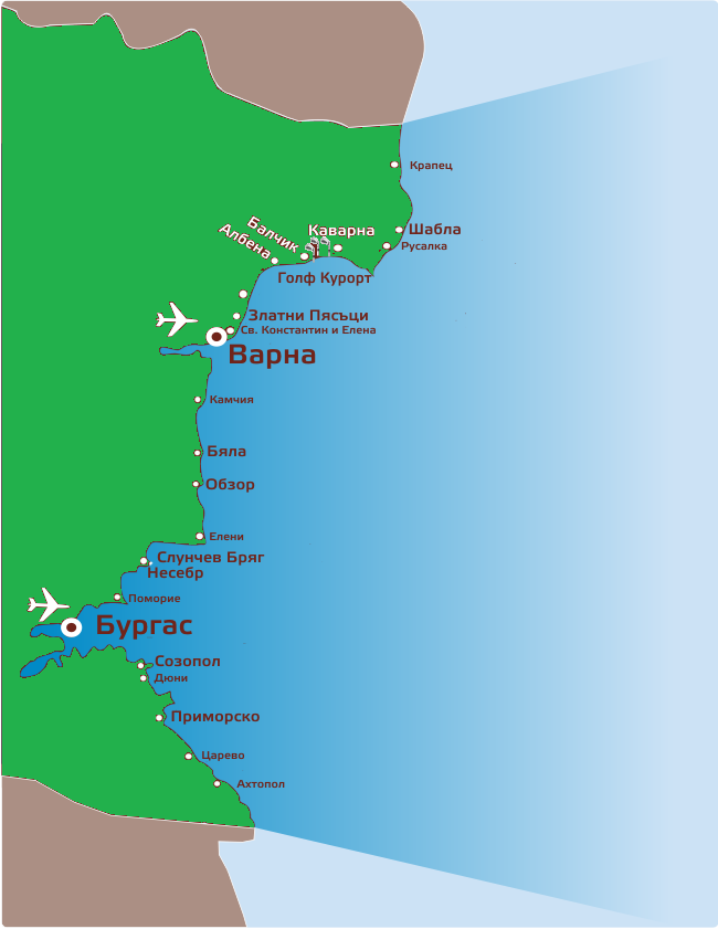 Карта на българския участък от Черно море с курортите ,градовете и двете летища.